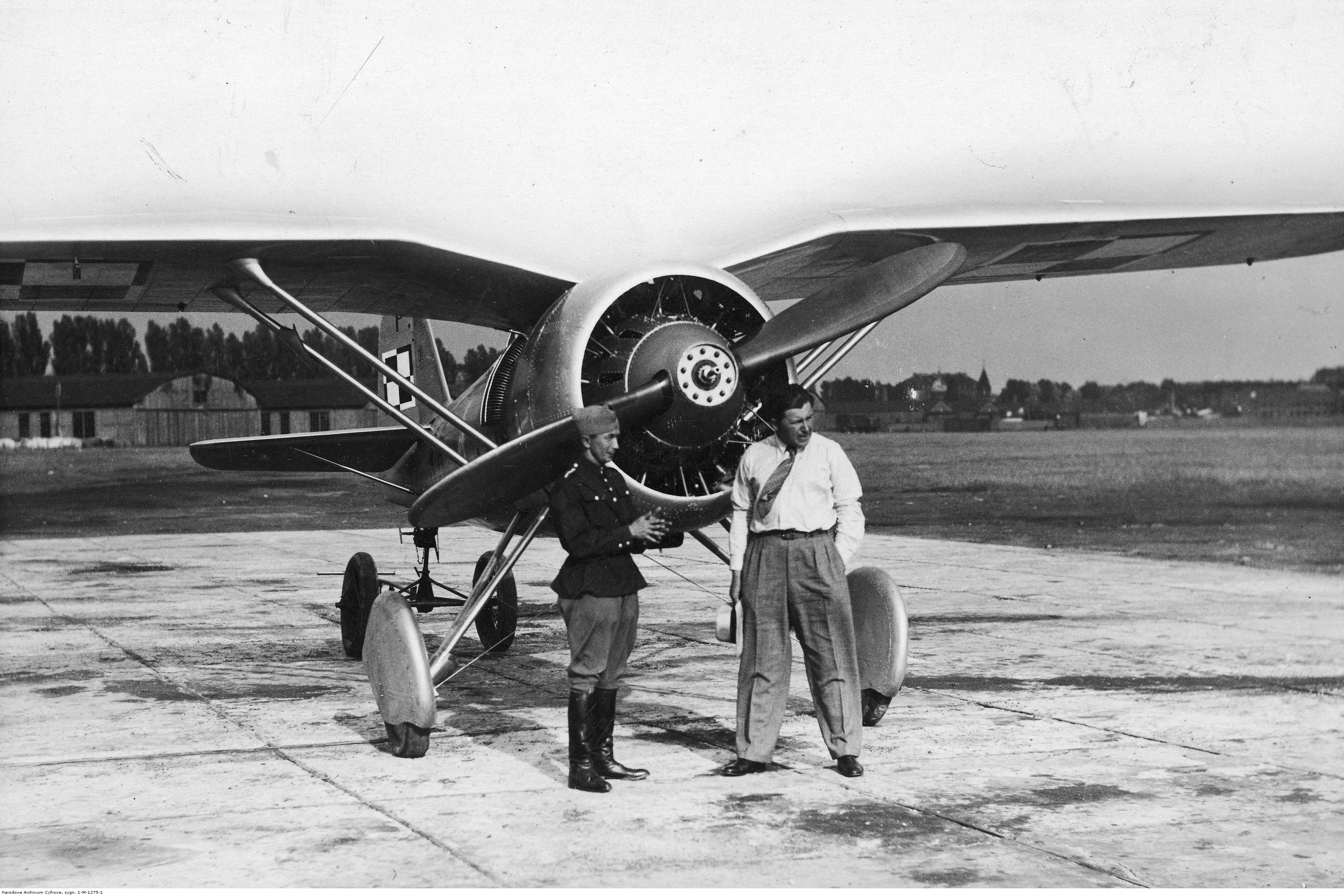 Piloci biorący udział w Międzynarodowym Lotniczym Rajdzie Alpejskim na płycie lotniska w Warszawie; lipiec 1932. Kpt. Bolesław Orliński (z prawej) i kpt. Jerzy Bajan przy prototypie samolotu PZL P.11. Koncern Ilustrowany Kurier Codzienny - Archiwum Ilustracji. Sygnatura: 1-M-1275-1